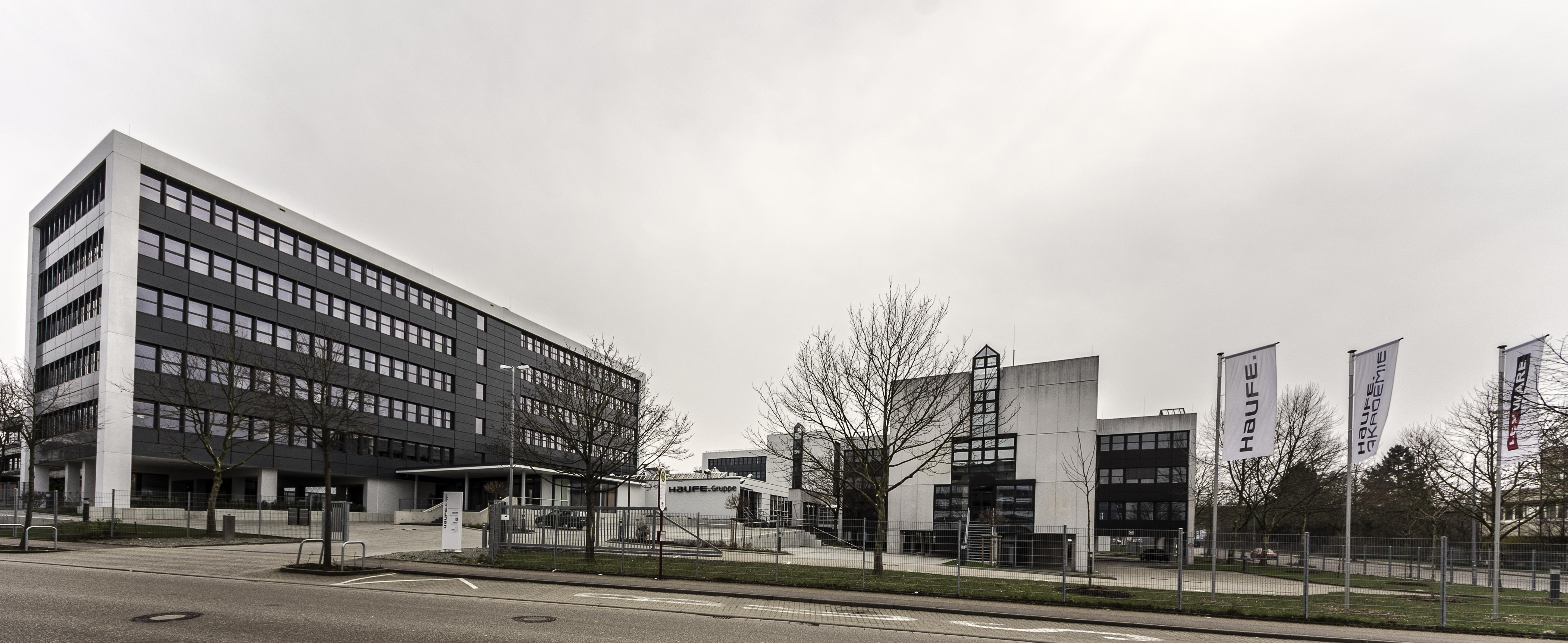 Haufe Verlagsgruppe